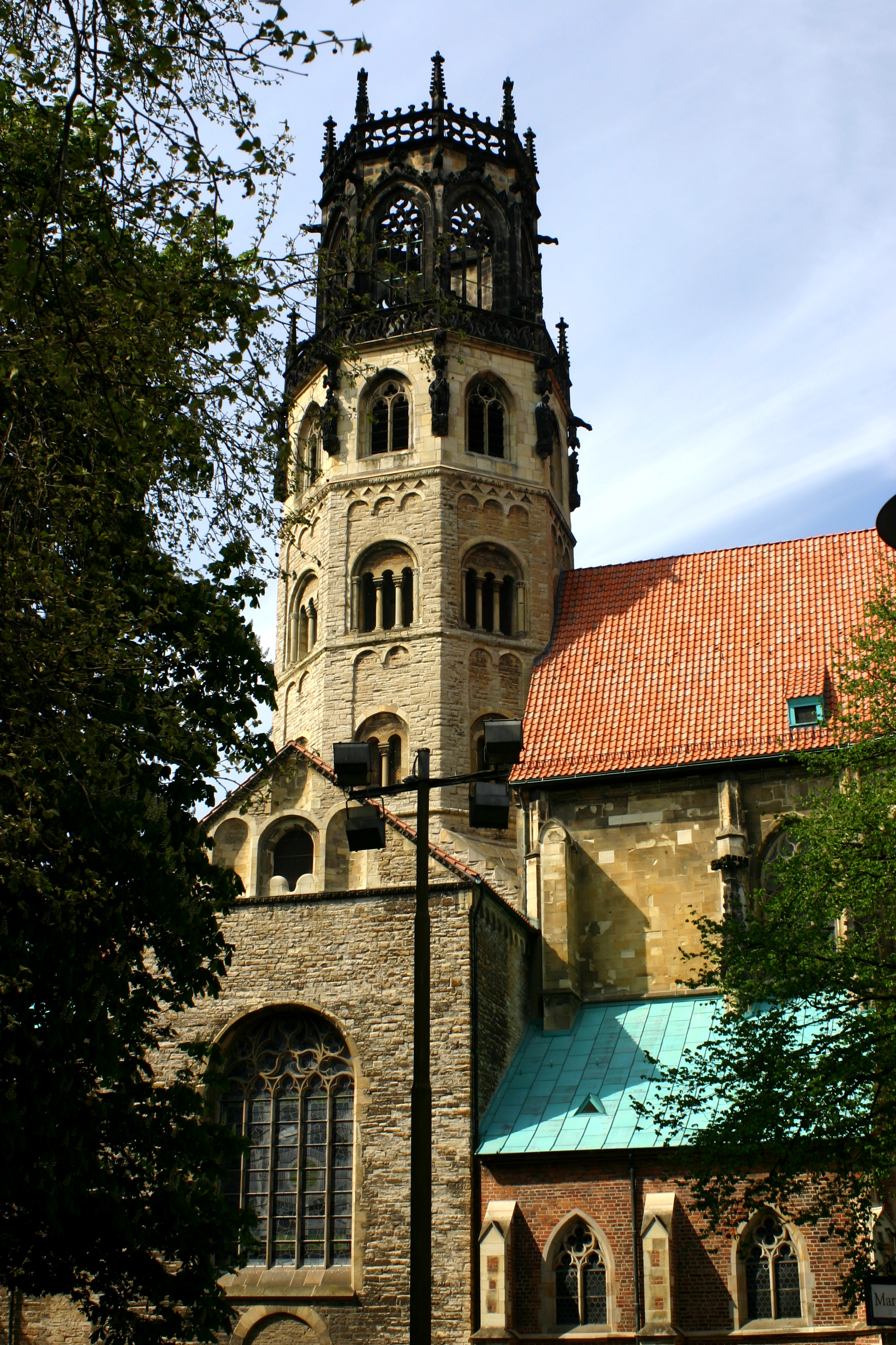 Die St. Ludgeri Kirche in Münster